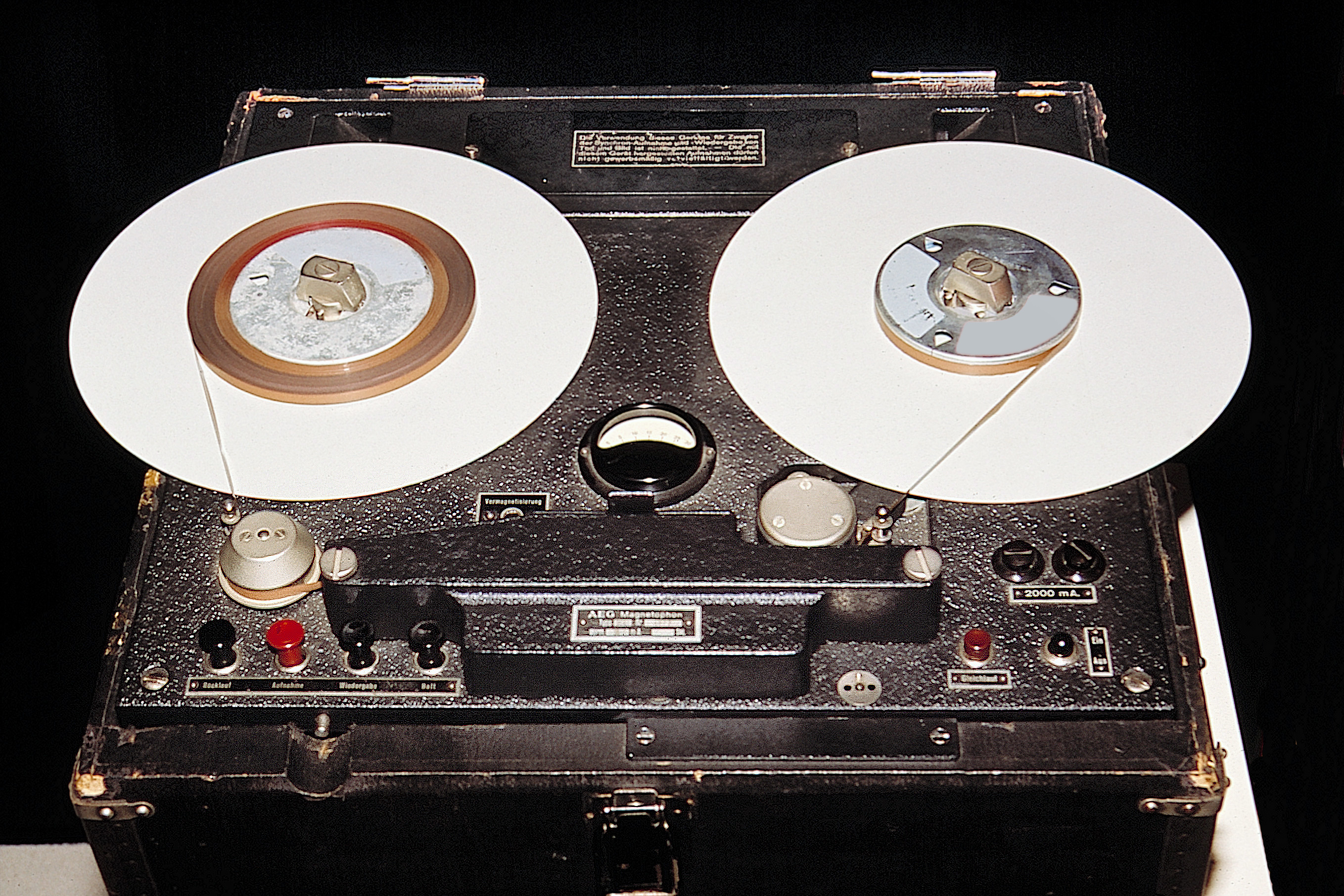 Magnetophon (Tonbandgerät), ein technischer Fortschritt im Rundfunk ab 1939, mit ca. 20 min Spielzeit ein wesentlicher Fortschritt gegenüber der auf ca. 4 min begrenzten Spielzeit einer Schallplatte und dieser ab 1941 auch qualitativ deutlich überlegen